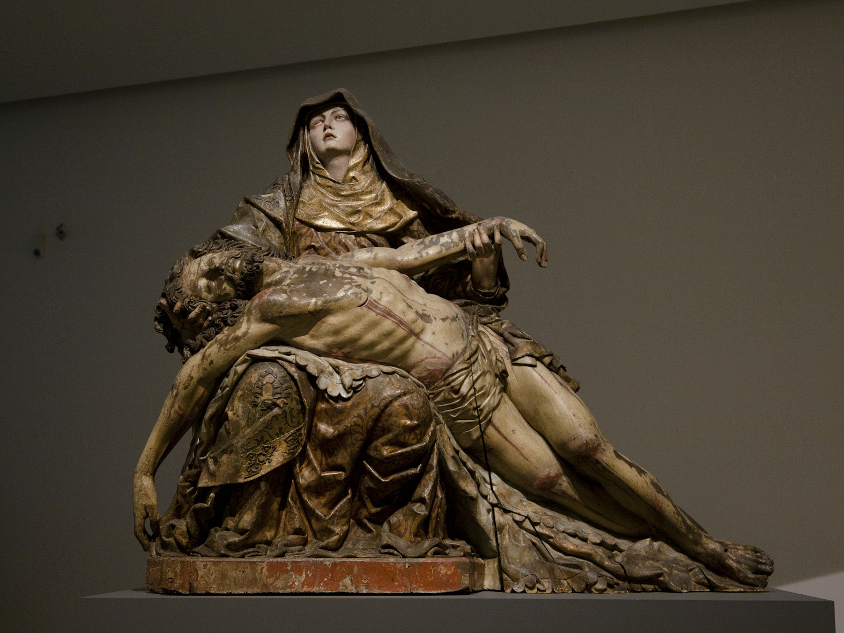 Frei Cipriano da Cruz, Pietá, Museu Nacional de Machado de Castro